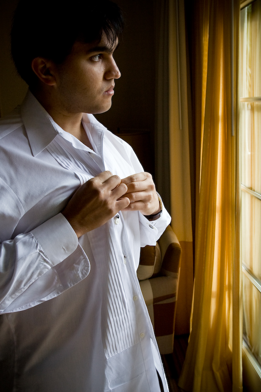 Man getting dressed.